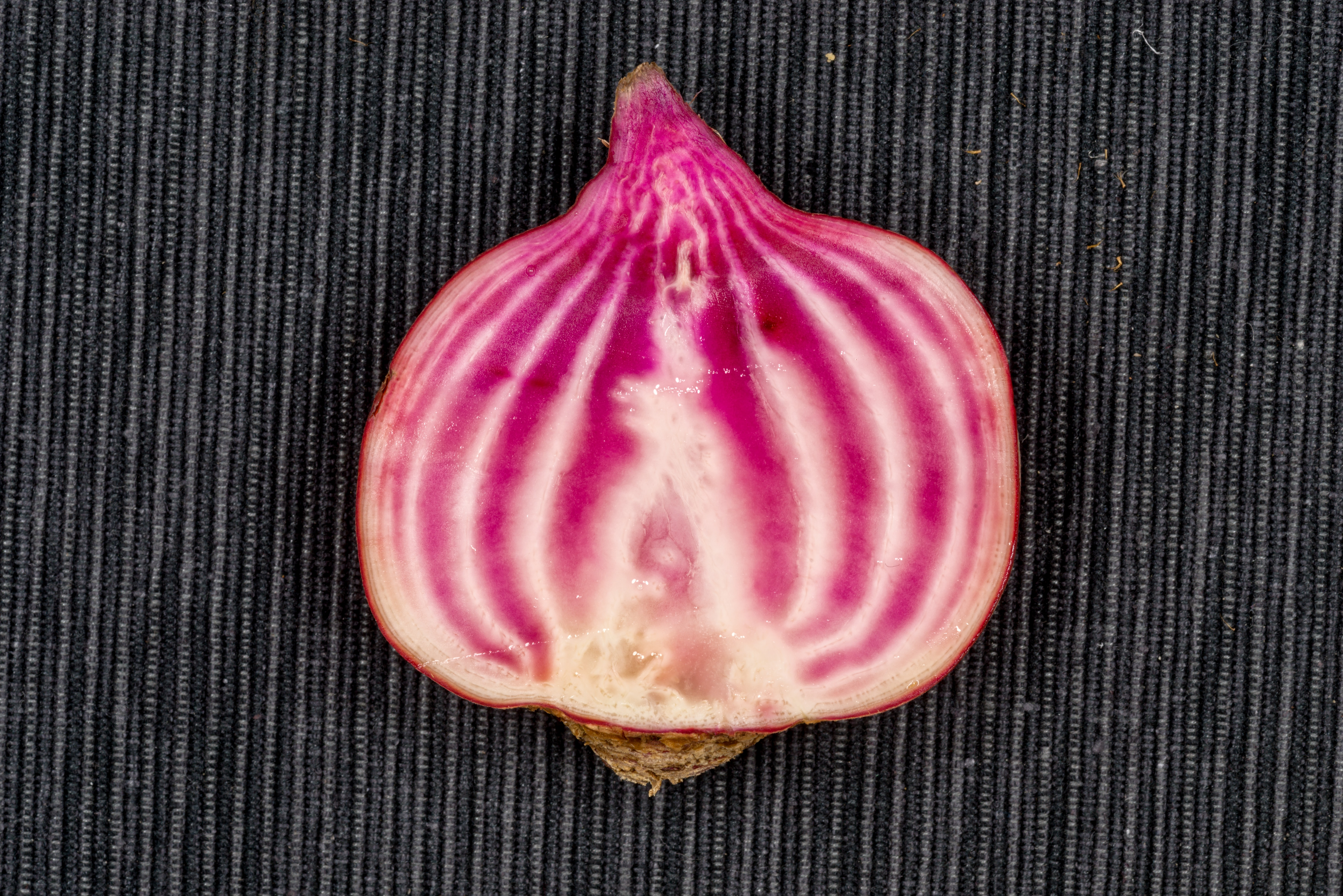 Bilder aus Freiburg im Breisgau Weiß-Rote Beete, Zuchtform der roten Beete